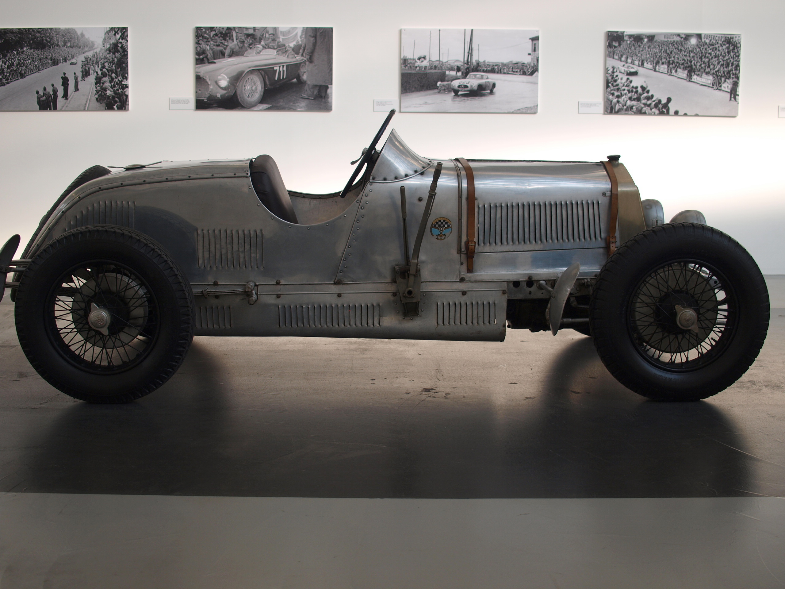 Om 469N 1922 L'evoluzione dell'automobile